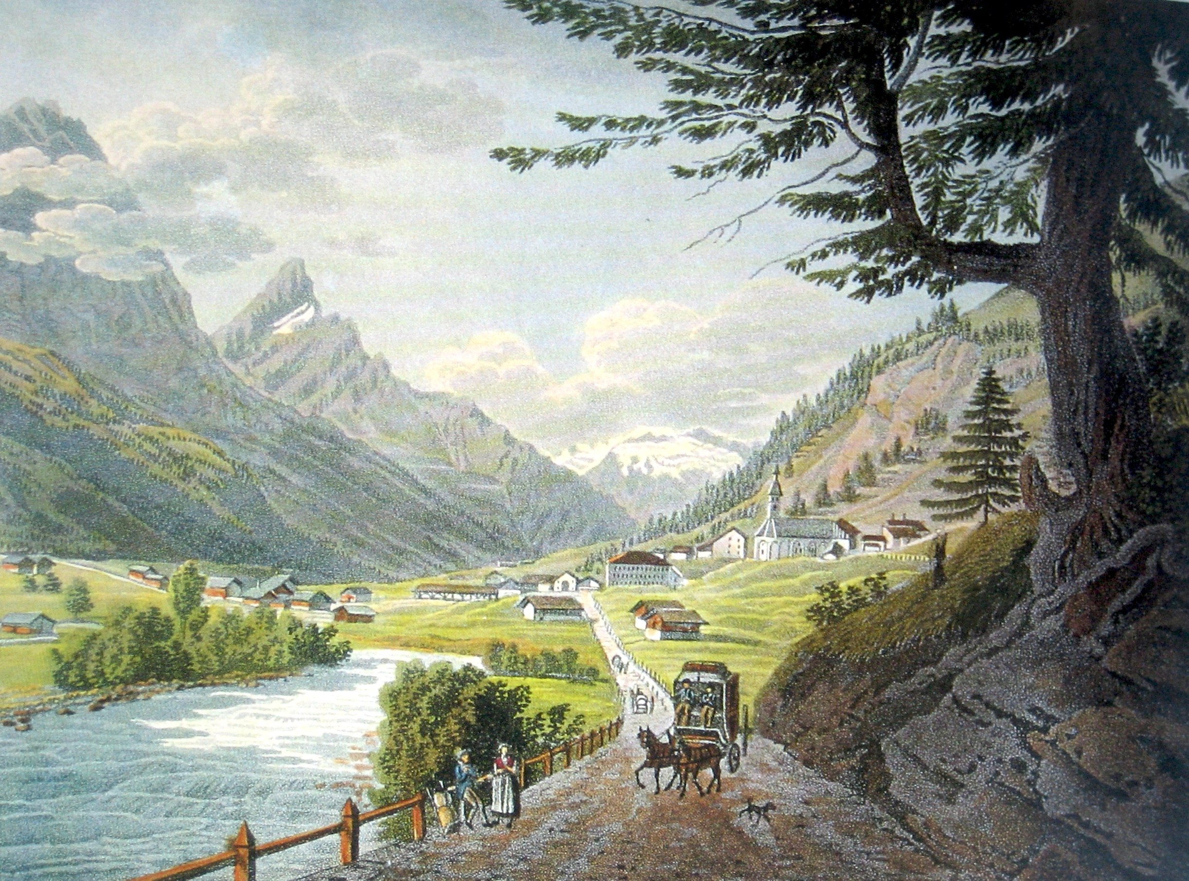 Splügen um 1825, Ansicht von Osten. Kol. Aquatinta von Johann Jakob Meier (1787 - 1858)